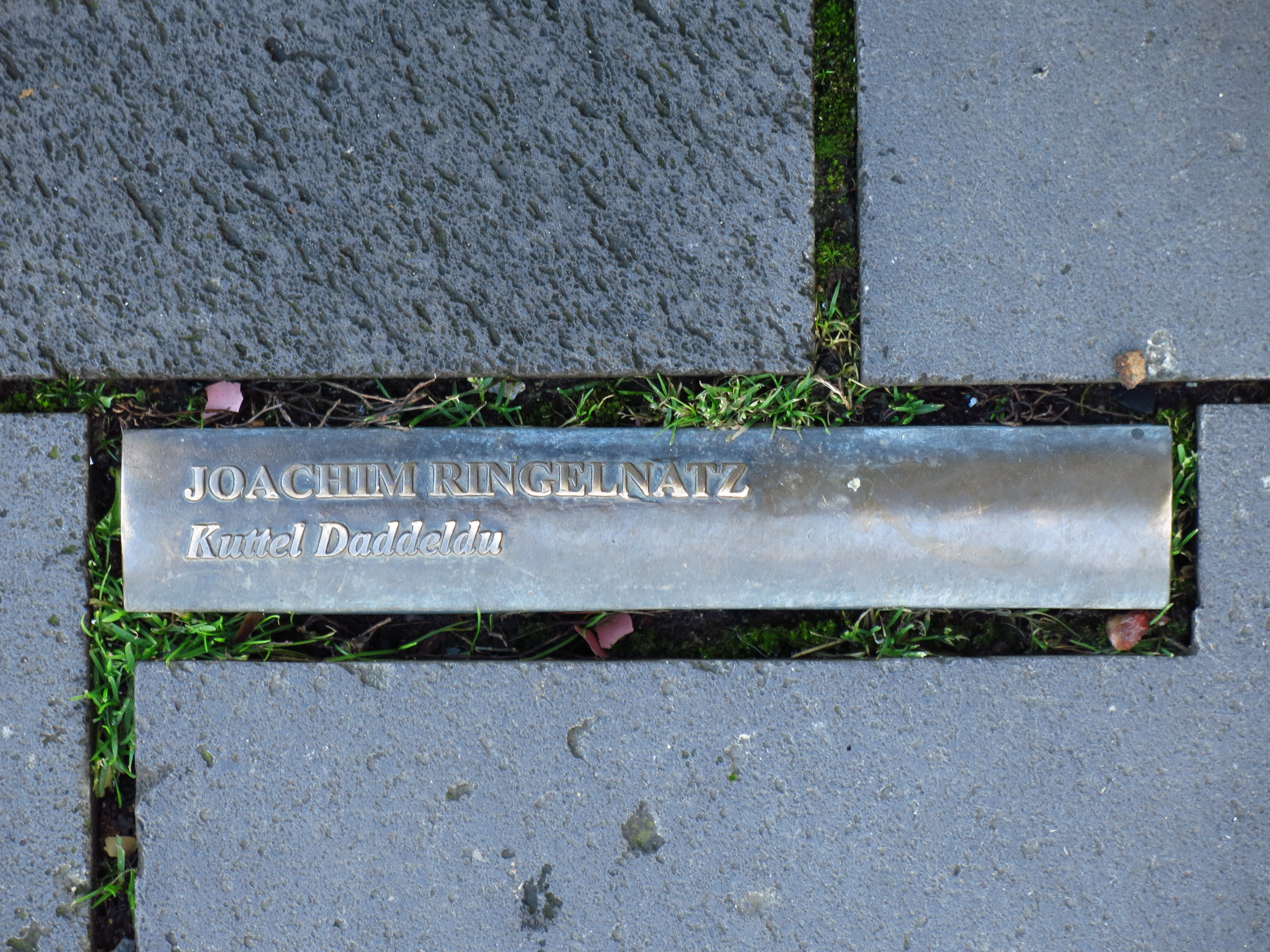 Das Mahnmal zur Bücherverbrennung auf dem Bonner Markt; In das Pflaster des Bonner Markt sind insgesamt 60 sichtbare Buchrücken, sogenannte „Lesezeichen“, verteilt, die sich an der Rathaustreppe, dem Ort an dem die Bücher am 10. Mai 1933 verbrannt wurden, verdichten. Zusätzlich wurde ein wetterfester Archiv-Behälter in Form einer Büchertruhe in den Platz eingelassen. Seine Inschrift benennt das Ereignis und weitere Autoren von verbrannten Büchern.